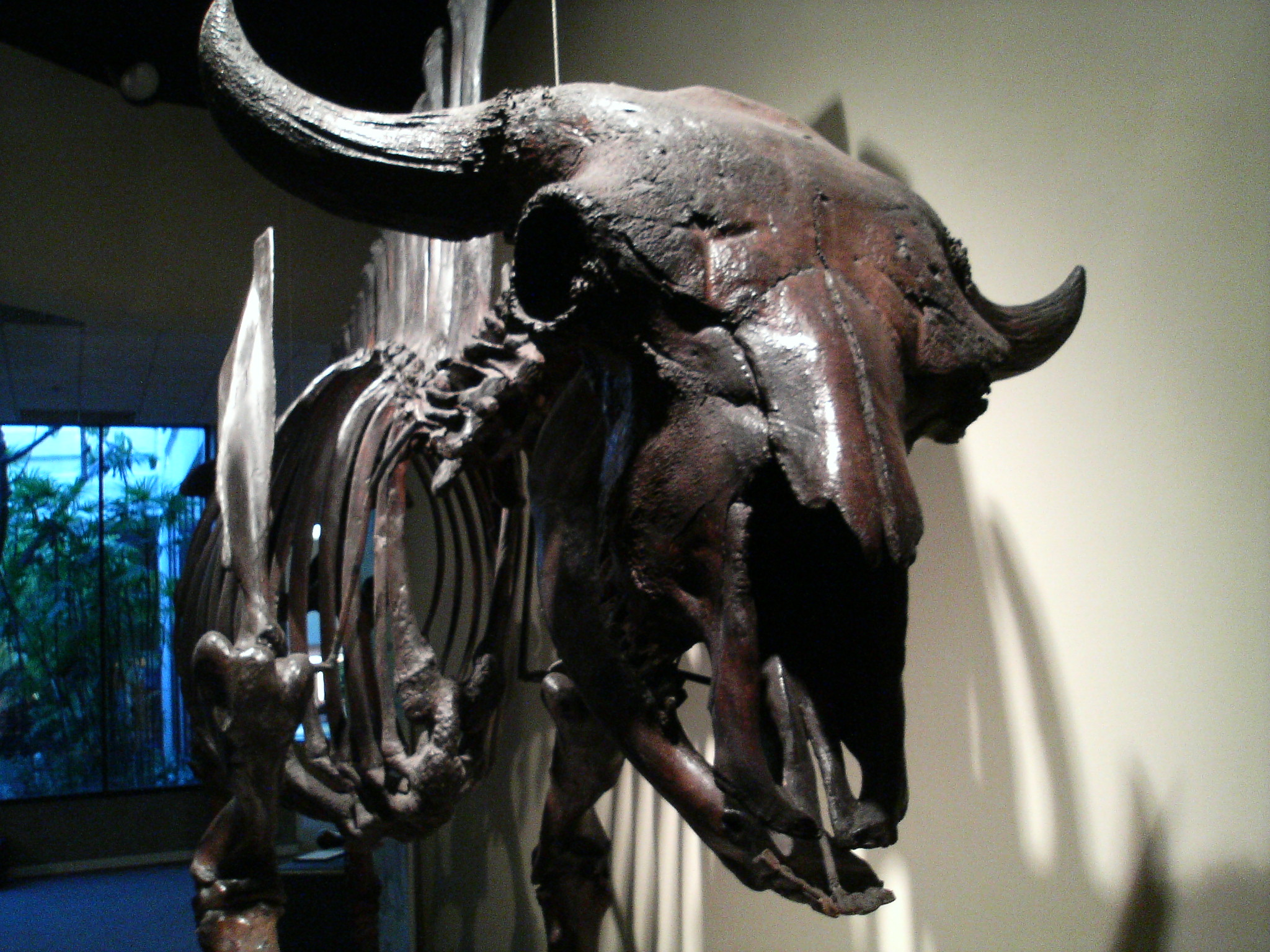 Bison skeleton, La Brea tarpits museum, LA2.jpg